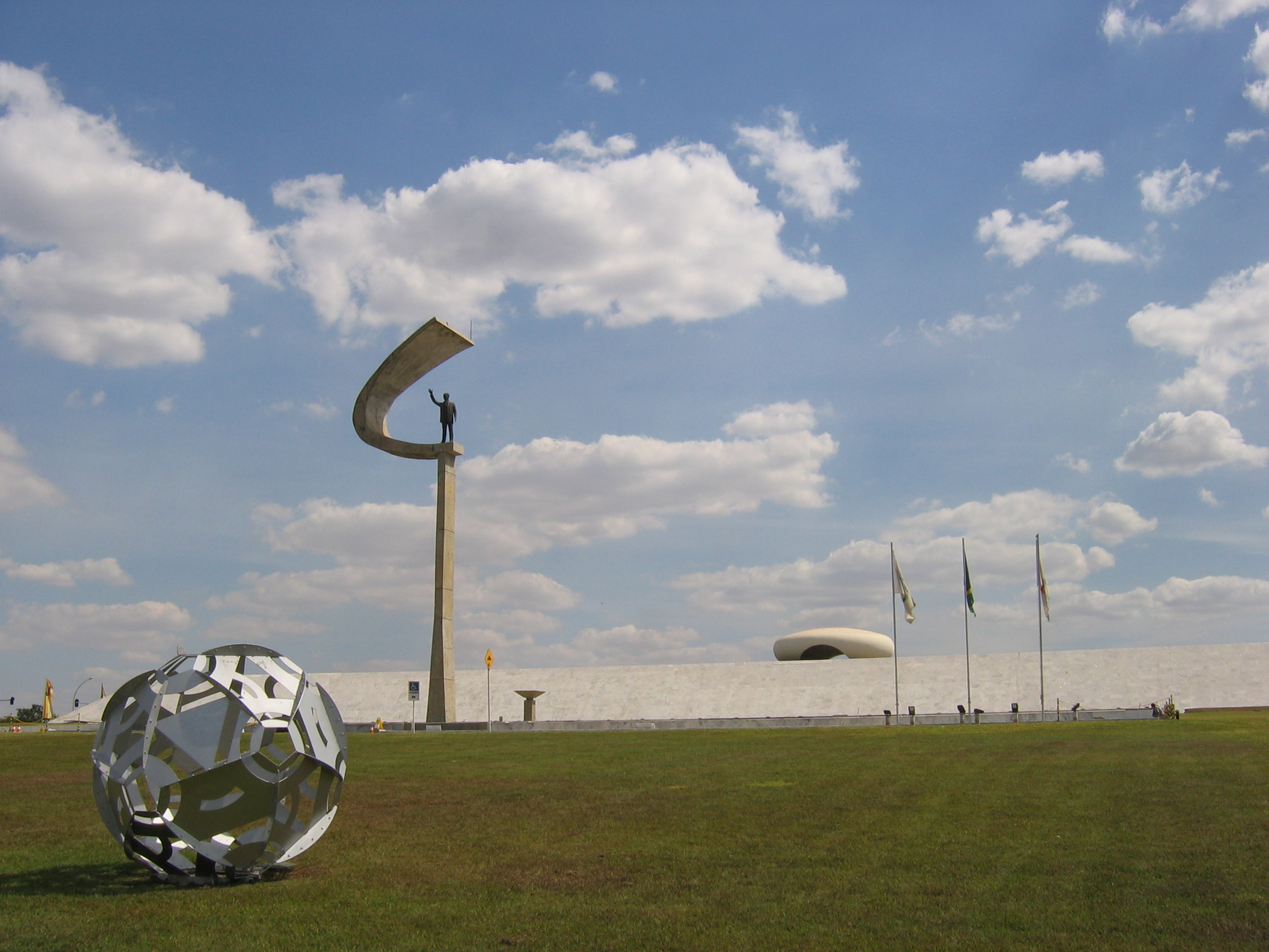 התמונה צולמה בידי, אורי רוזנהק.